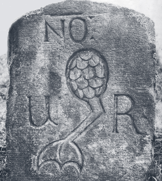 Grenzstein mit ursprünglichem Unterriexinger Wappen (Gänseschlegel)